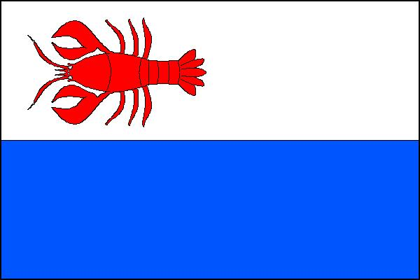 Vlajka obce Pasohlávky